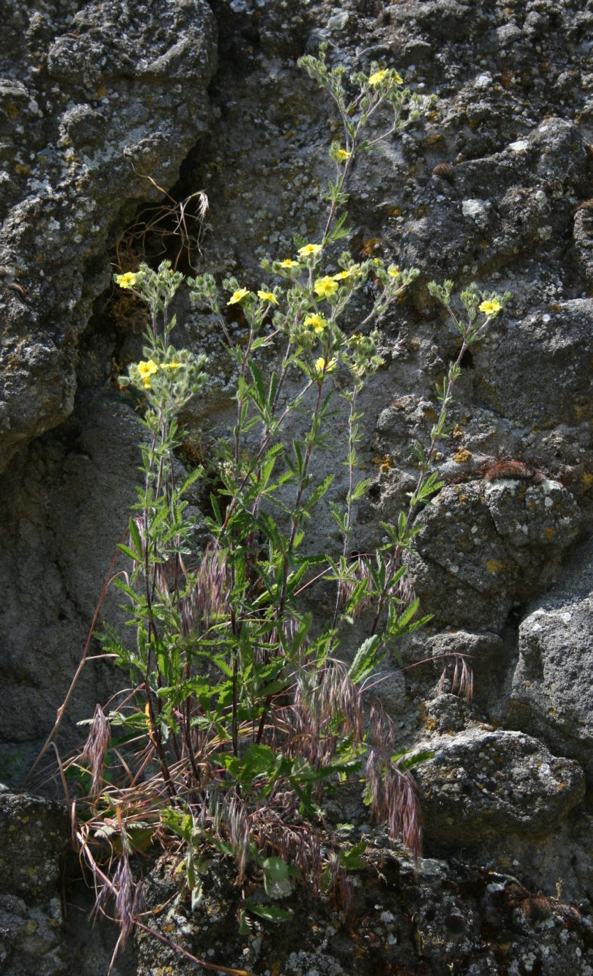 Grau-Fingerkraut (Potentilla inclinata), Rosengewächse (Rosaceae) - Ungarn/Magyarország/Hungary: Pest megye, Burg Visegrád